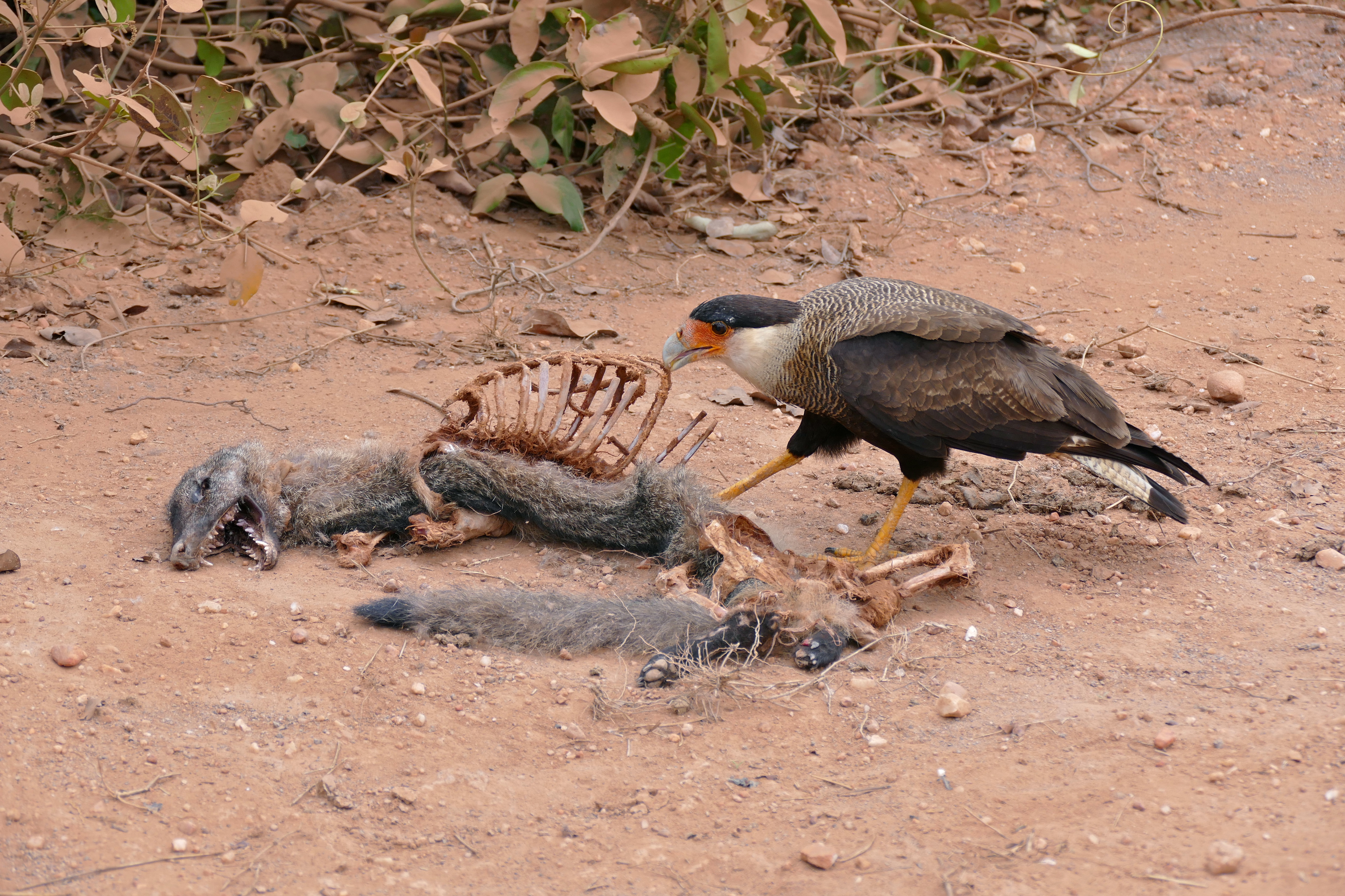 Transpantaneira, Poconé, Mato Grosso, BRAZIL